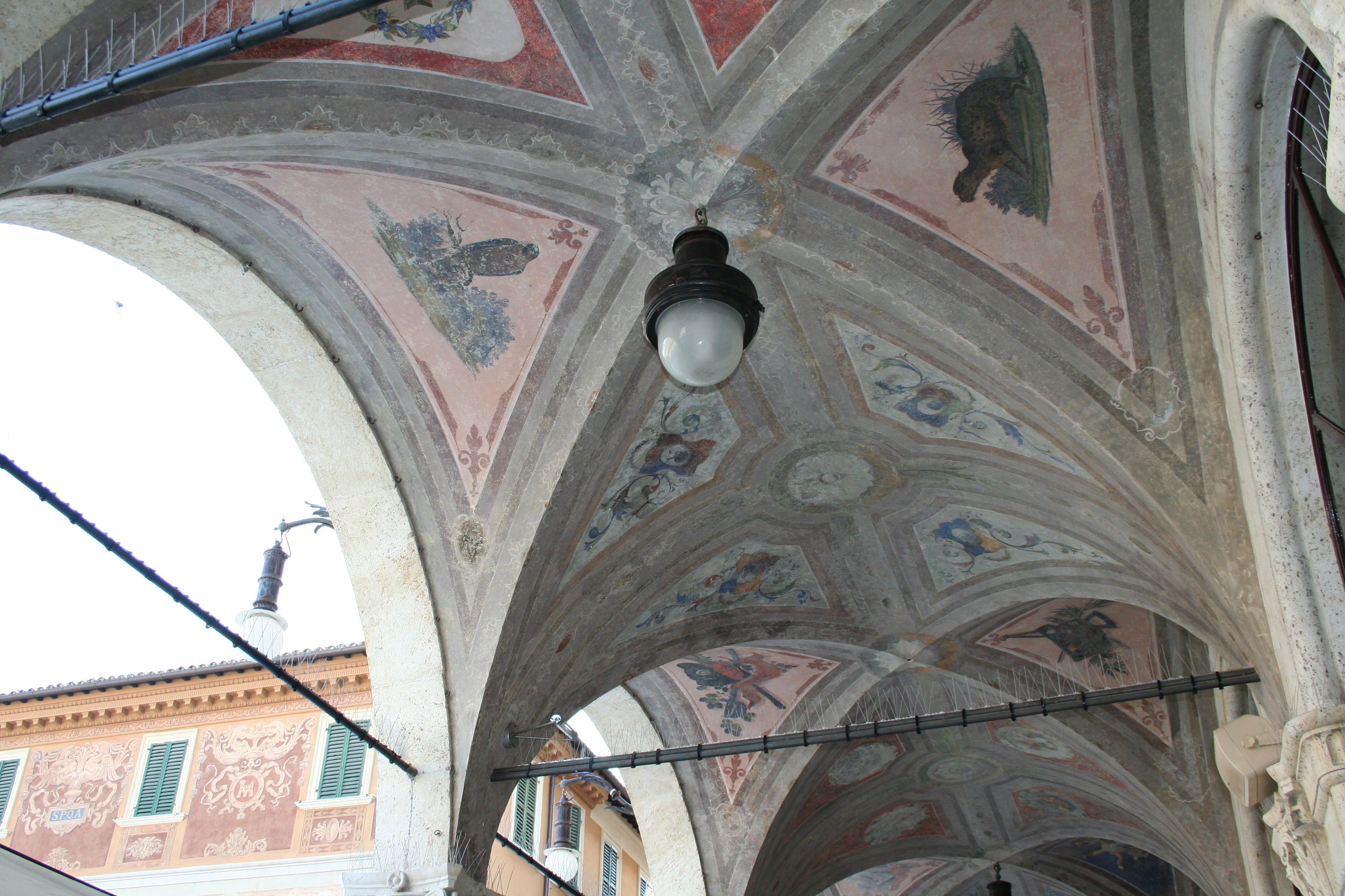 Soffitto esterno loggetta Caffè Meletti, ottobre 2006.